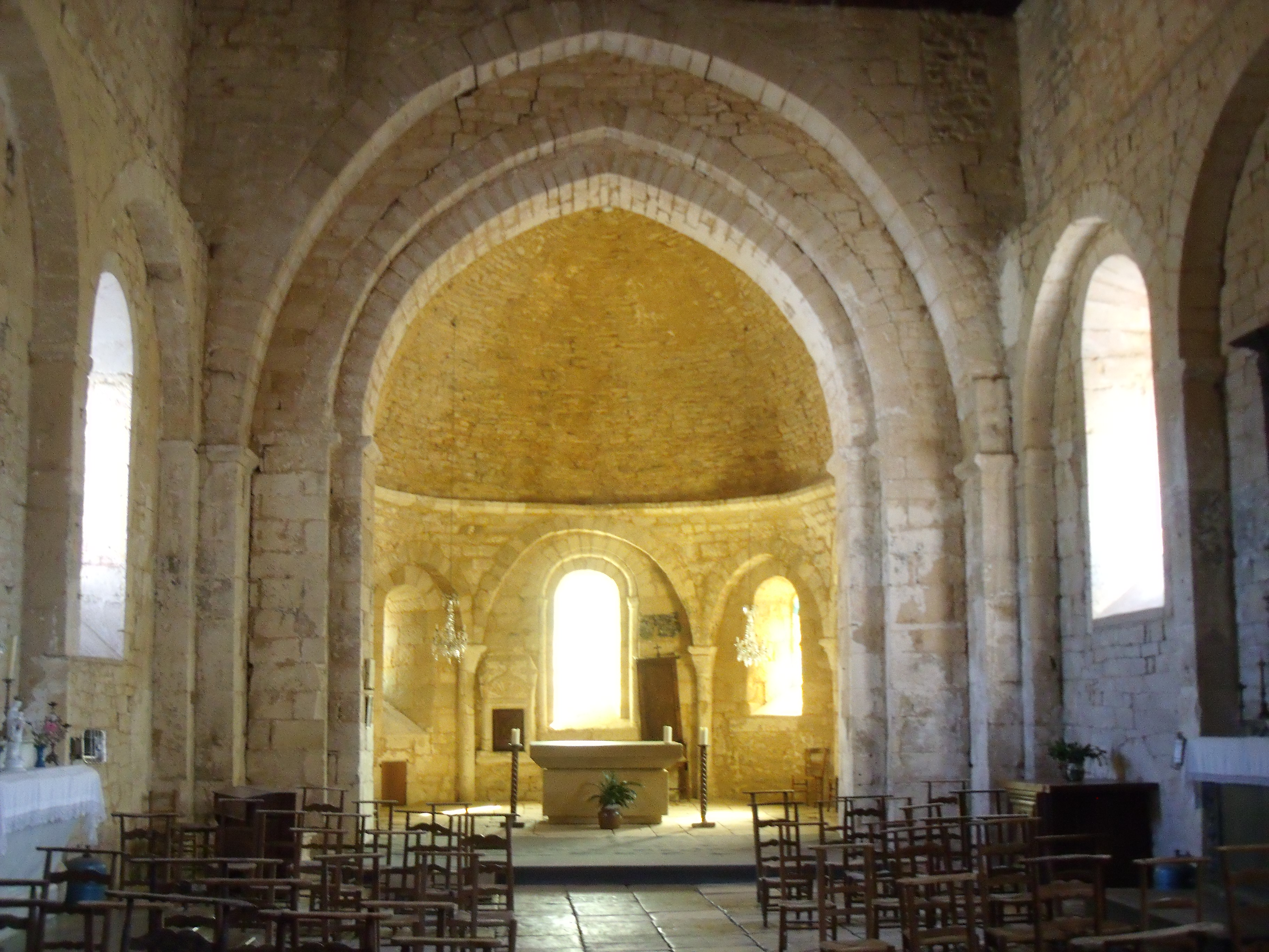 Intérieur de l'église Saint Martin - Ajat, Dordogne, France